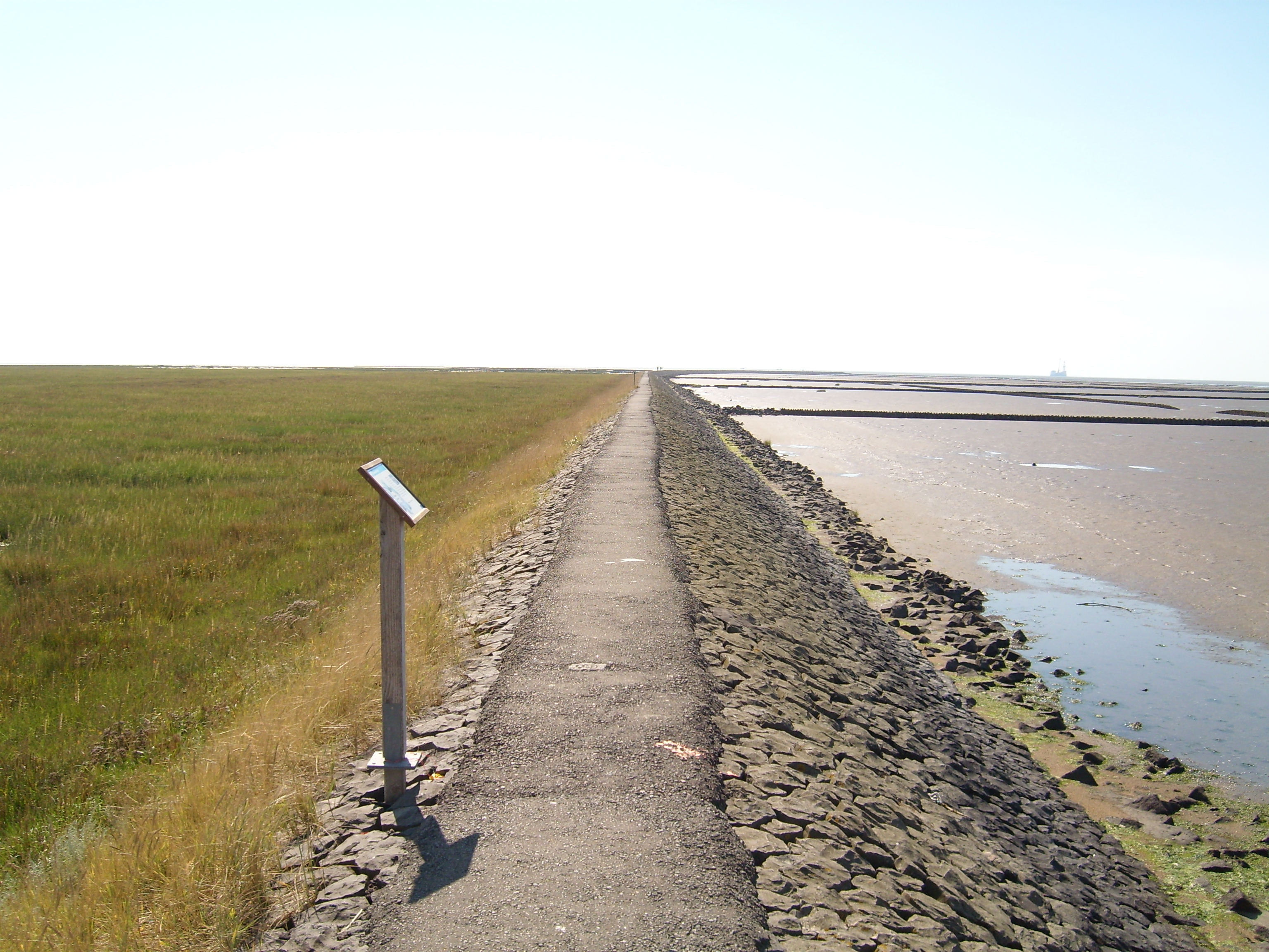 Der Trischendamm im Wattenmeer bei Friedrichskoog-Spitze mit Blick auf das Meer (Niedrigwasser), August 2007. Rechts am Horizont ist die Ölplattform Mittelplate zu sehen. The Trischendamm in the Wadden Sea near Friedrichskoog-Spitze.